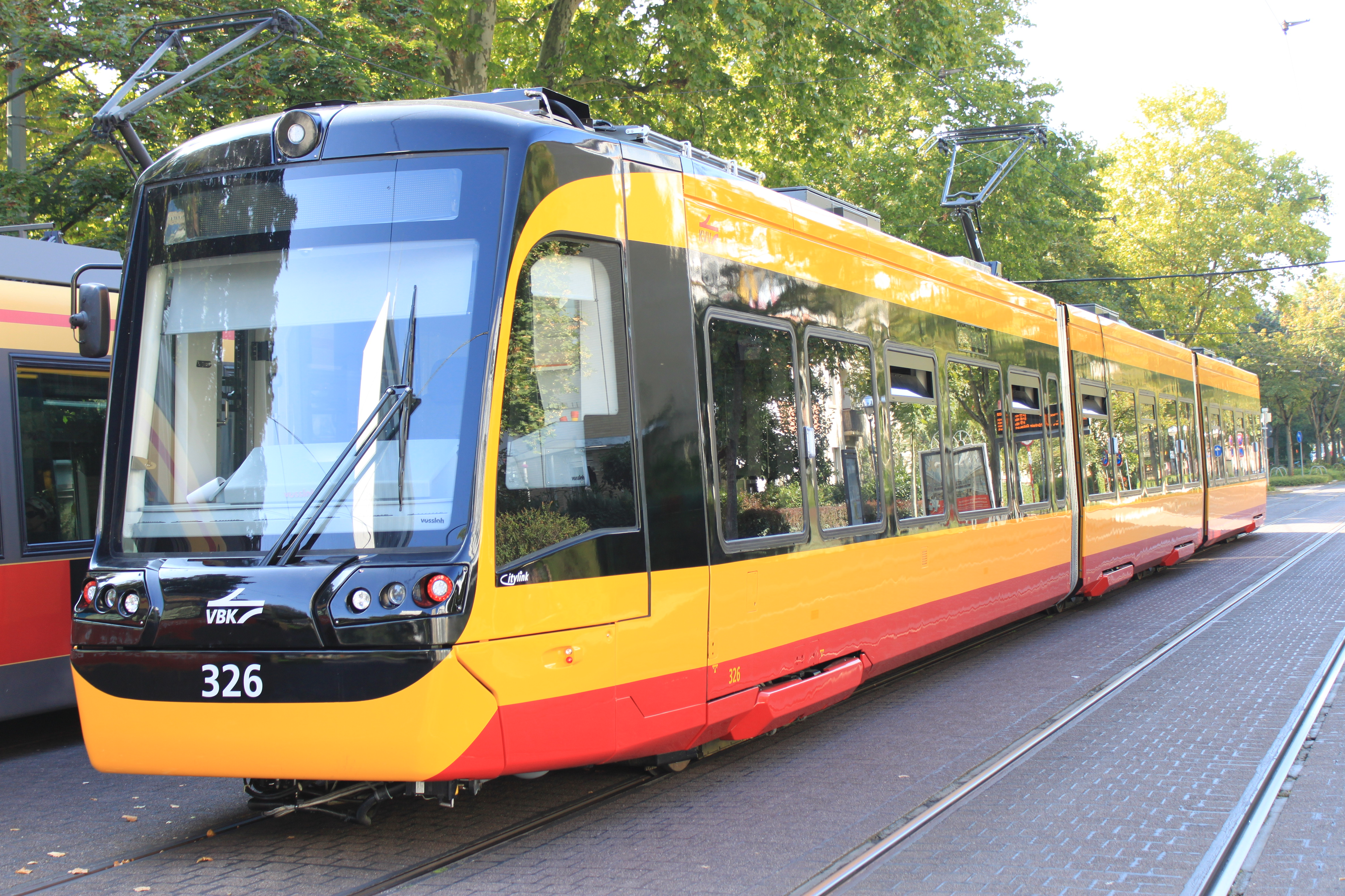 KVV 326 am Konzerthaus auf dem mittleren Abstellgleis.